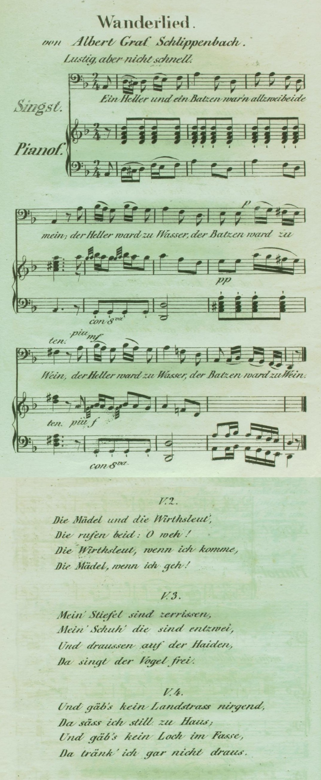 Ein Heller und ein Batzen in der Vertonung von Franz Kugler